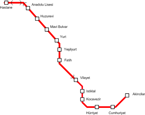 Схема линий Аданского метро